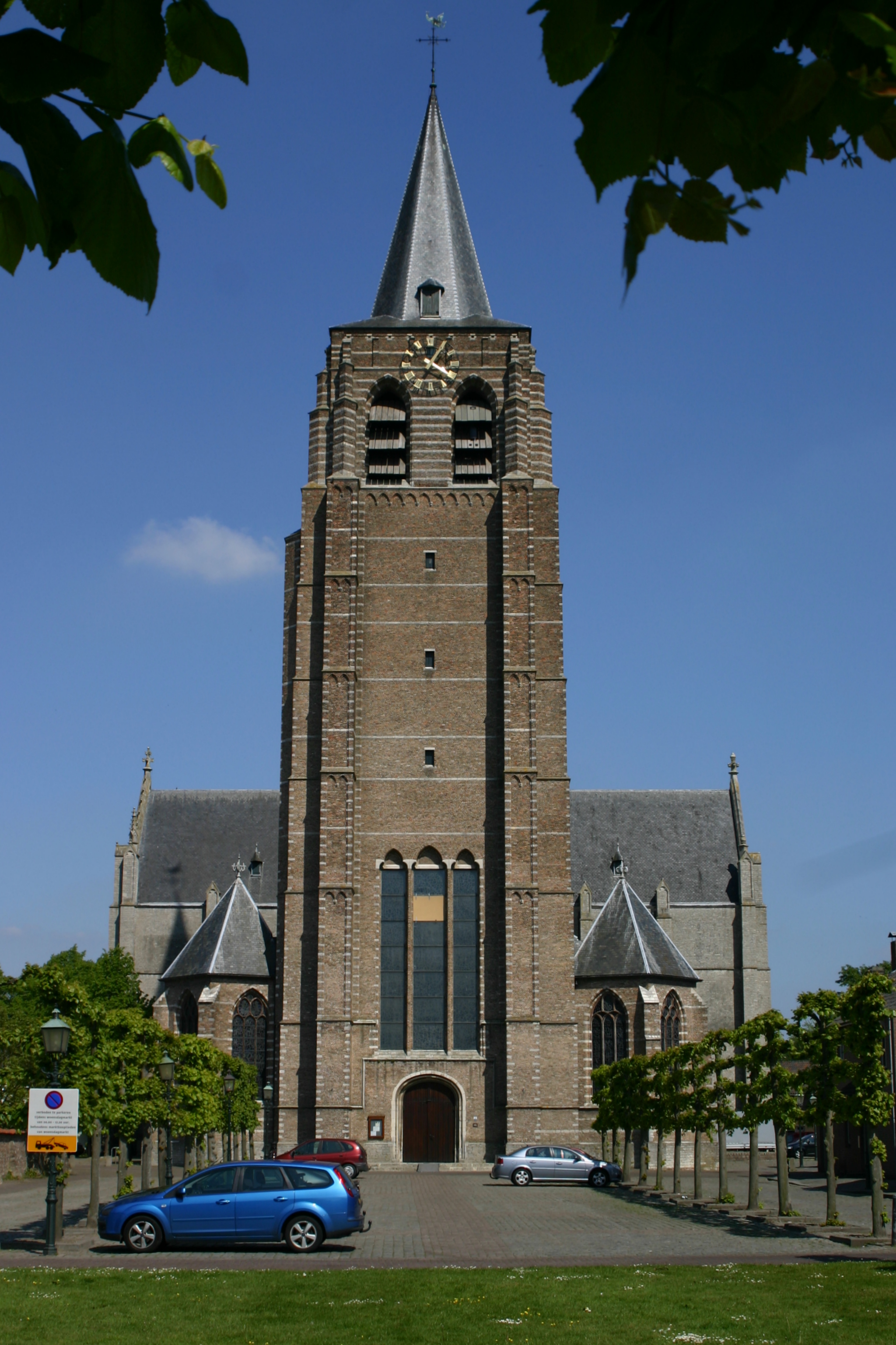 St. Lambert's church, Wouw